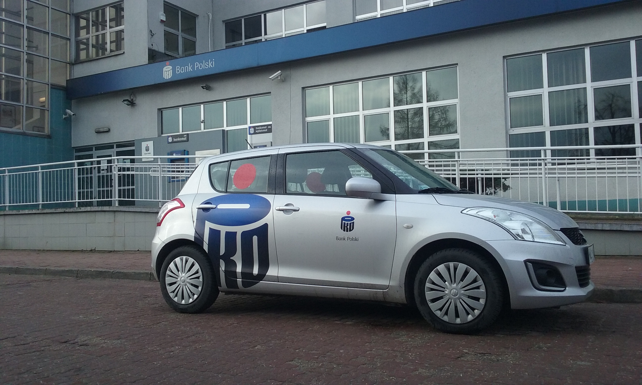 Samochód PKO BP przed główną siedzibą banku w 60-tysięcznym Tomaszowie Mazowieckim, w województwie łódzkim